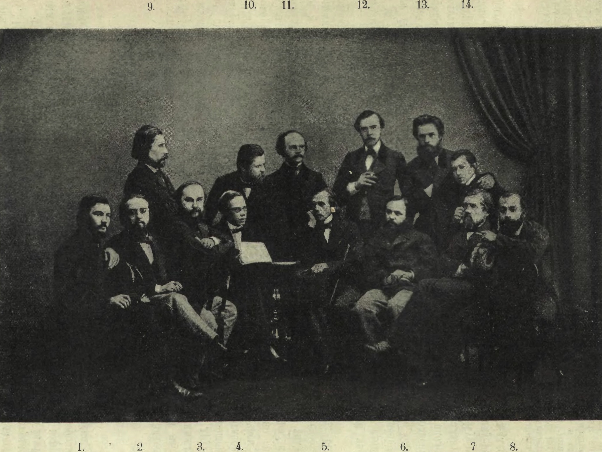 Редакция сатирического журнала "Искра" 1860 году. 1. М. М. Стопановский 2. Д. Д. Минаев 3. Н. С. Курочкин 4. Н. Л. Ломан 5. Н. А. Степанов 6. В. С. Курочкин 7. Г. З. Елисеев 8. П. И. Вейнберг 9. Н. В. Иевлев 10. Живописец А. Волков 11. Композитор А. С. Даргомыжский 12. В. Тоблин 13. Гравёр Куренков 14. С. Н. Степанов (сын Н. А. Степанова)